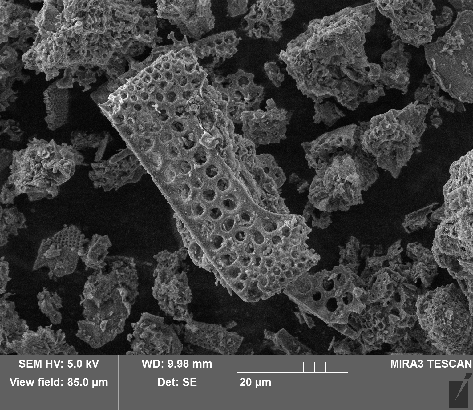 Диатомит при увеличении в 5000 раз